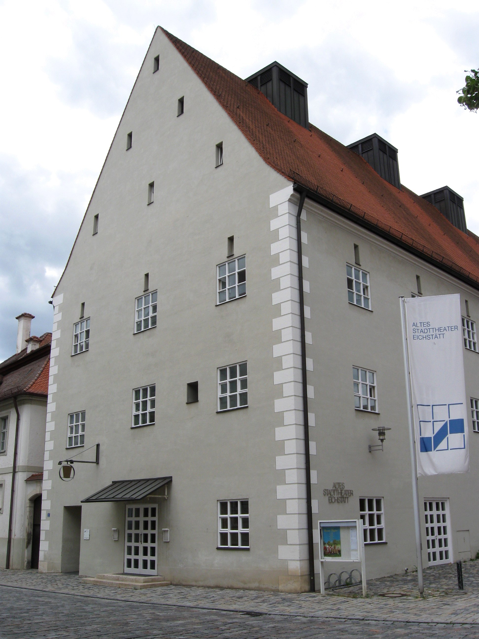 Residenzplatz 17; ehemaliger Fürstbischöflicher Getreidekasten, heute Kino, langgestreckter, mit der östlichen Traufseite den Holbeinplatz abschließender Steilgiebelbau, dreigeschossig mit Eckquaderungen, an der Westseite Treppenturm, nach 1545. D-1-76-123-85